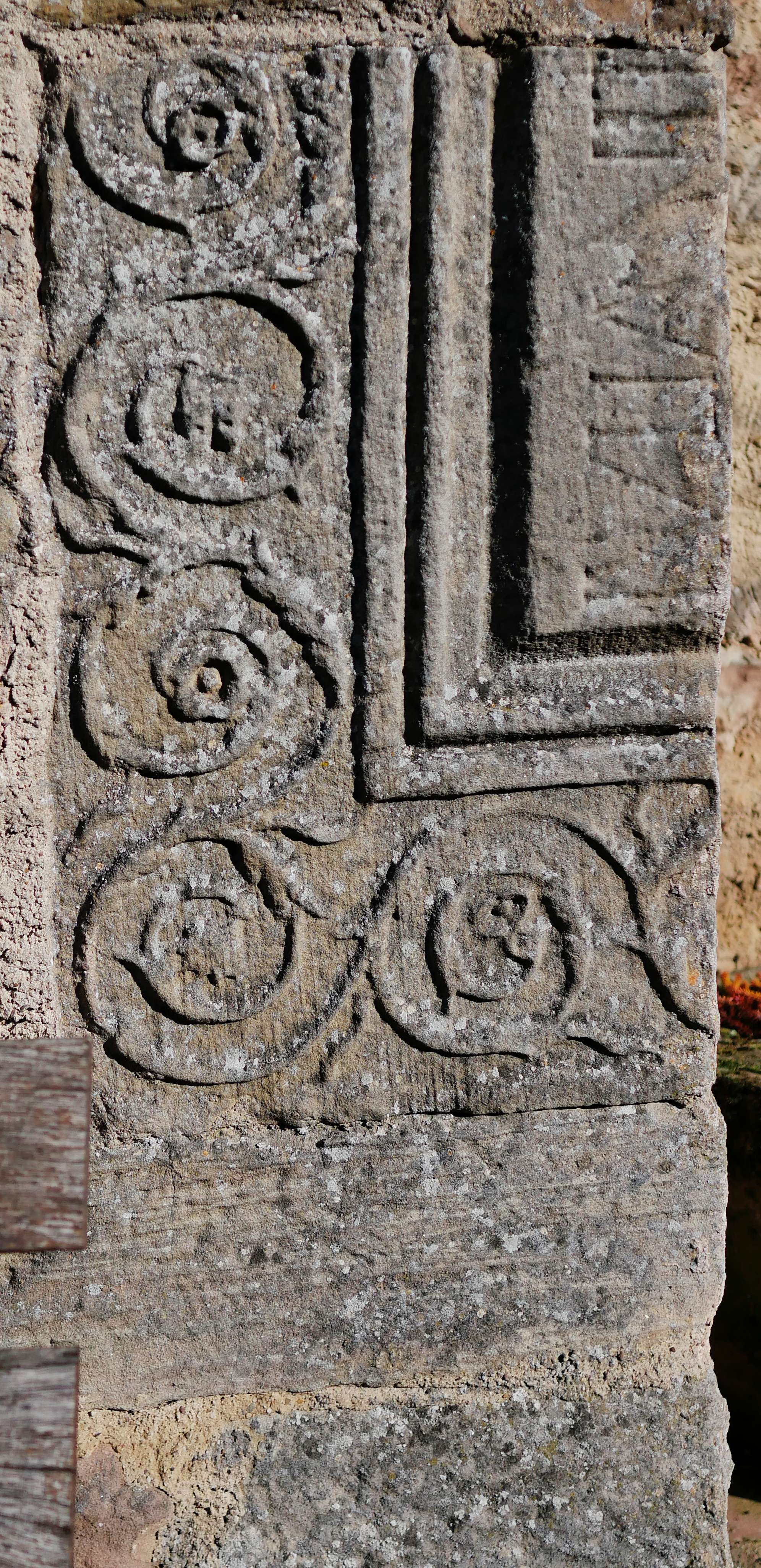 Römisches an Kirche St. Abriuculus in Besslich (Rheinland-Pfalz, Kreis Trier-Saarburg)